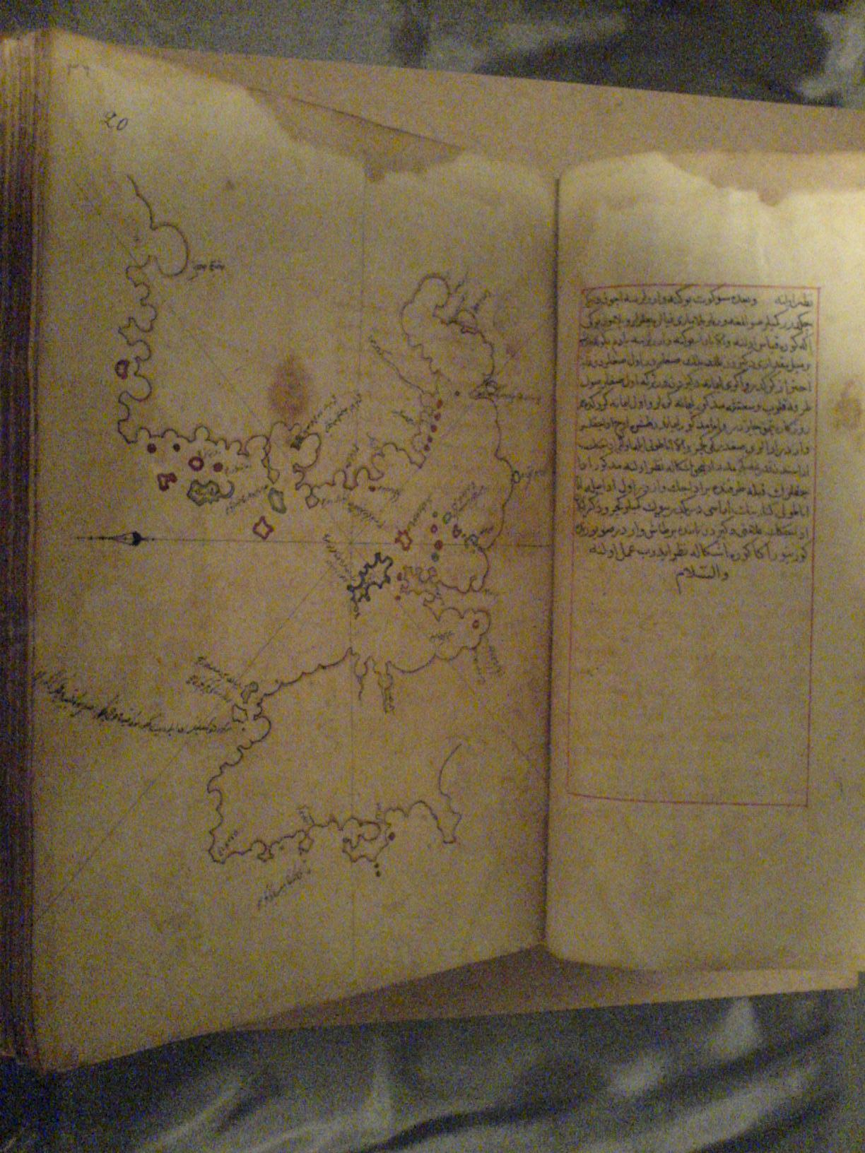 Piri reis'in Kitab-ı Bahriye kıtabındaki İzmir körfezi haritası Map of the İzmir gulf from Kitab-ı Bahriye was written by Piri Reis